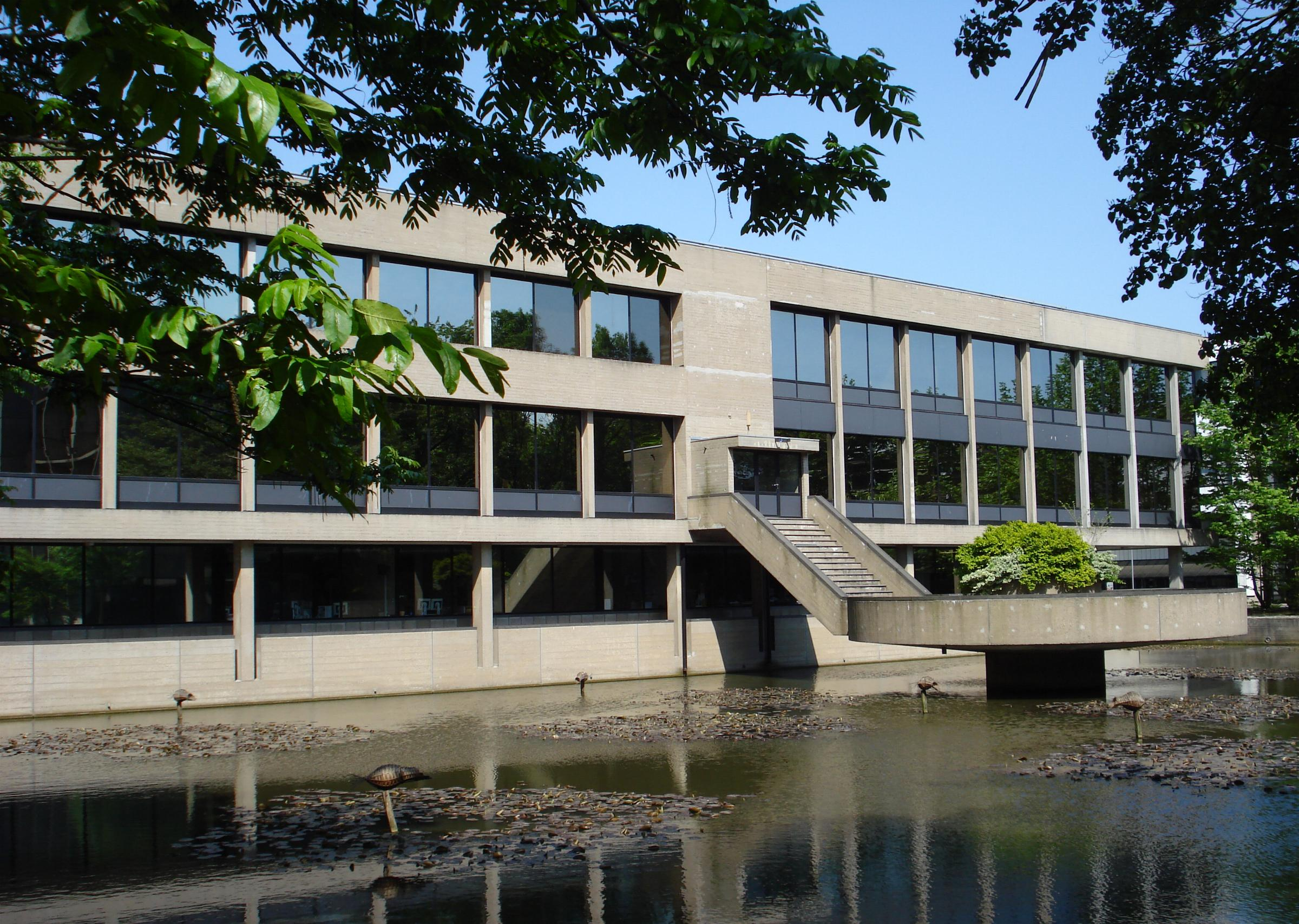 Rotterdam. Erasmus universiteit: Bibliotheek. Gemeentemonument. Architect: Cornelis Elffers